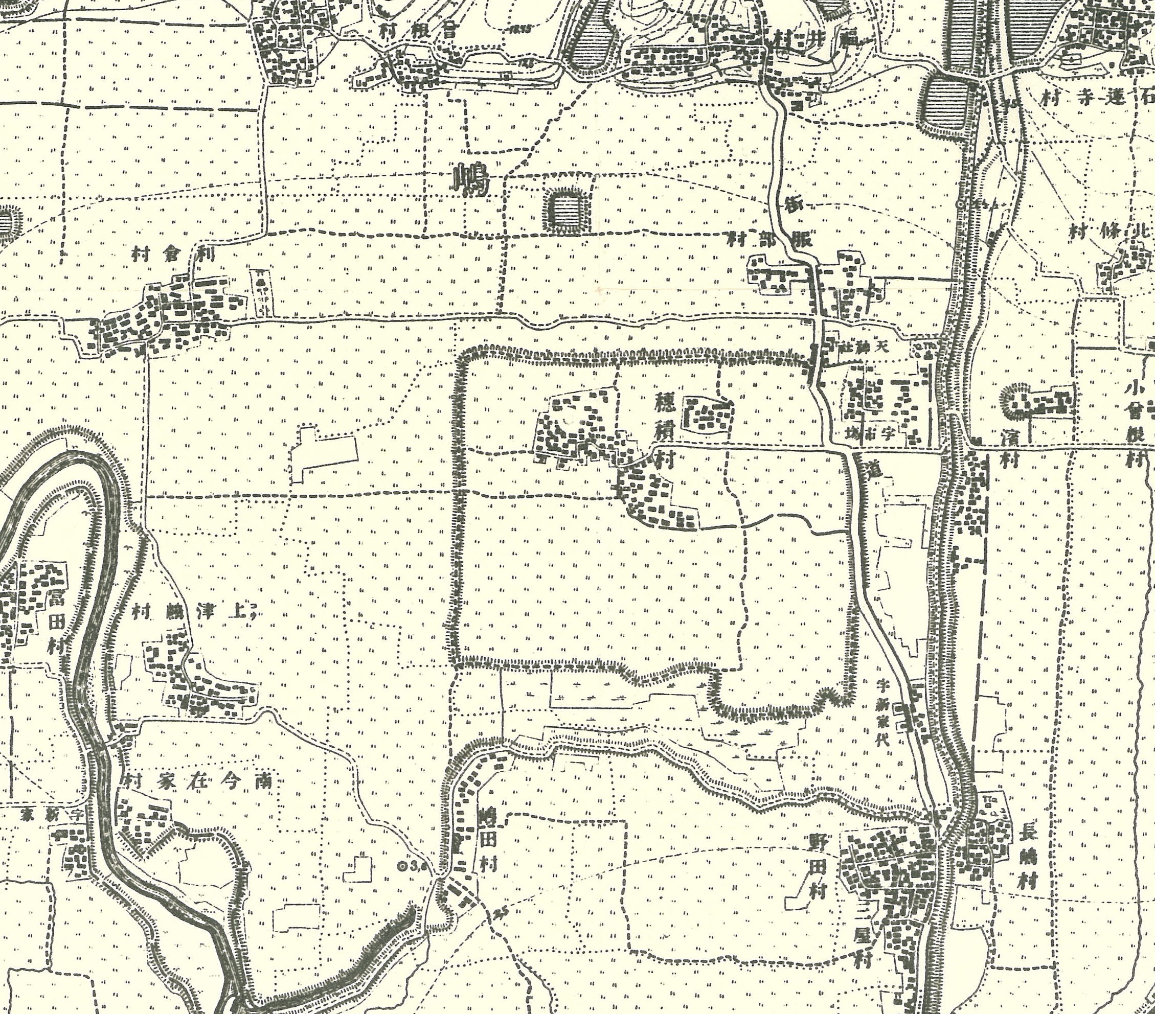 明治18年(1885)測量同20年製版「伊丹町」二万分の一仮製地形図から穂積村周辺をトリミングしたもの